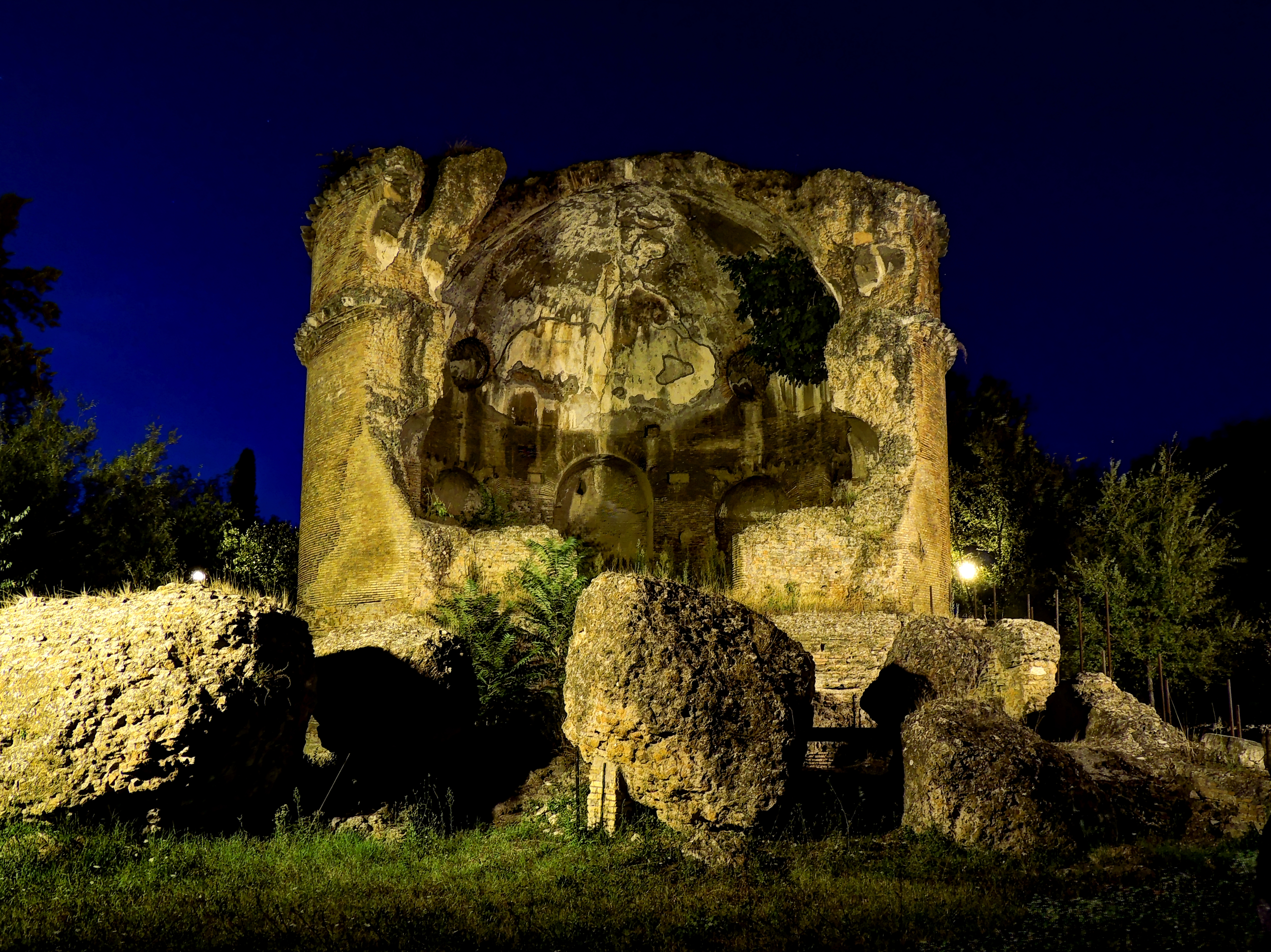 Villa Gordiani This is a photo of a monument which is part of cultural heritage of Italy.